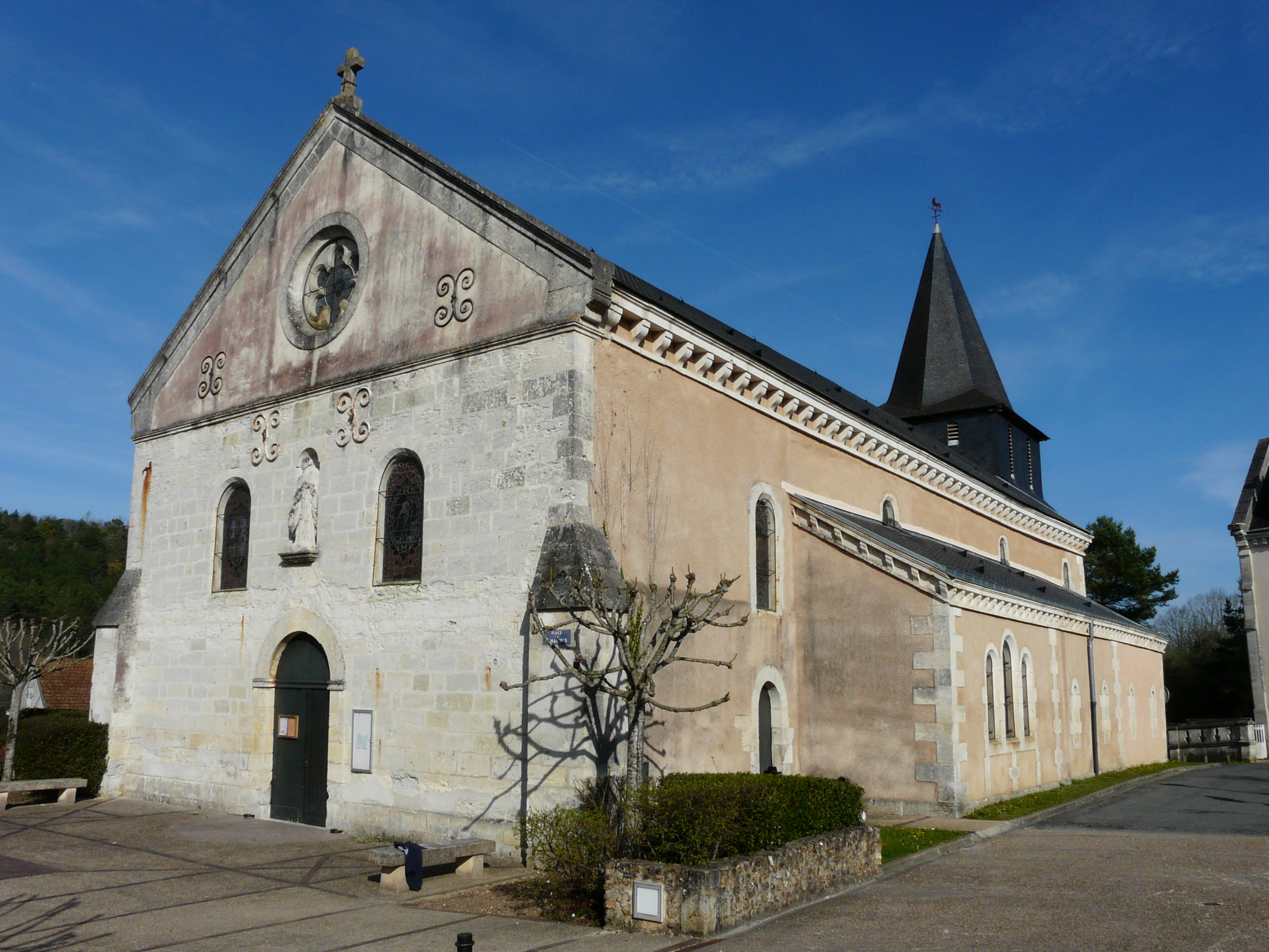 L'angle sud de l'église Notre-Dame-des-Vertus, Notre-Dame-de-Sanilhac, Dordogne, France.